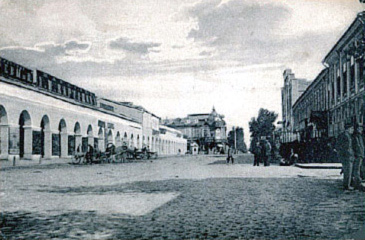 Таганрогская улица и Гостиный двор, конец XIX века